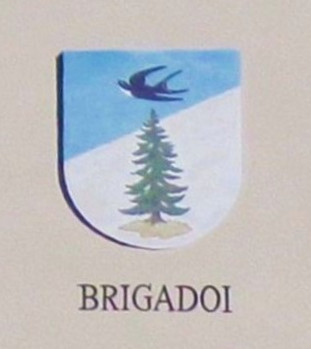 Cognomi storici dei Vicini che discendono dalle famiglie della Regola che abitavano a Predazzo e riguardano 19 cognomi: Boninsegna, Bonora, Bosin, Brigadoi, Defrancesco, Degaudenz, Dellagiacoma, Dellantonio, Dellasega, Demartin, Dezulian, Felicetti, Gabrielli, Giacomelli, Guadagnini, Morandini, Nicolao, Piazzi e Zanna.